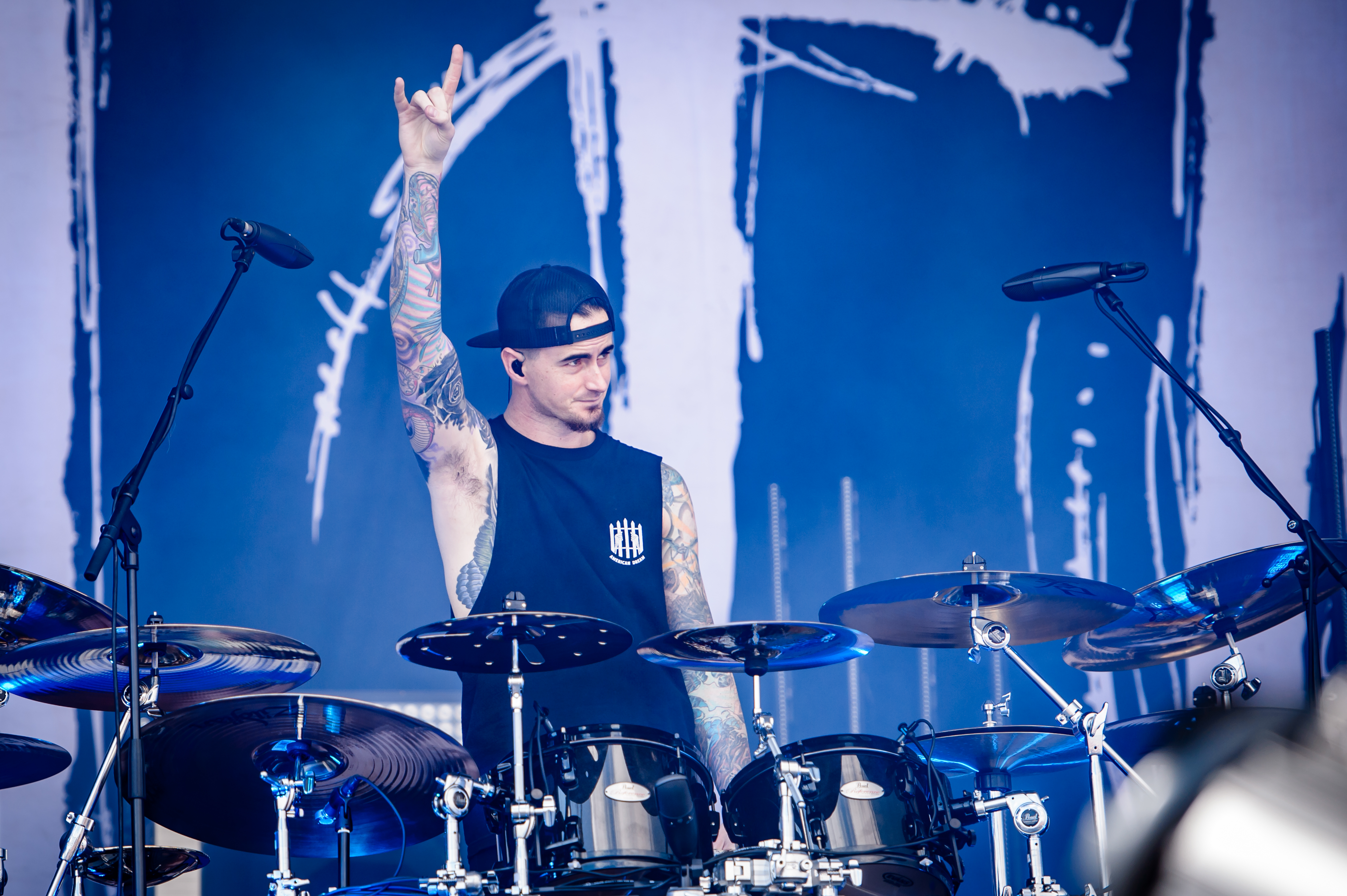 'Rock im Park 2017; Nürnberg': 'In Flames'